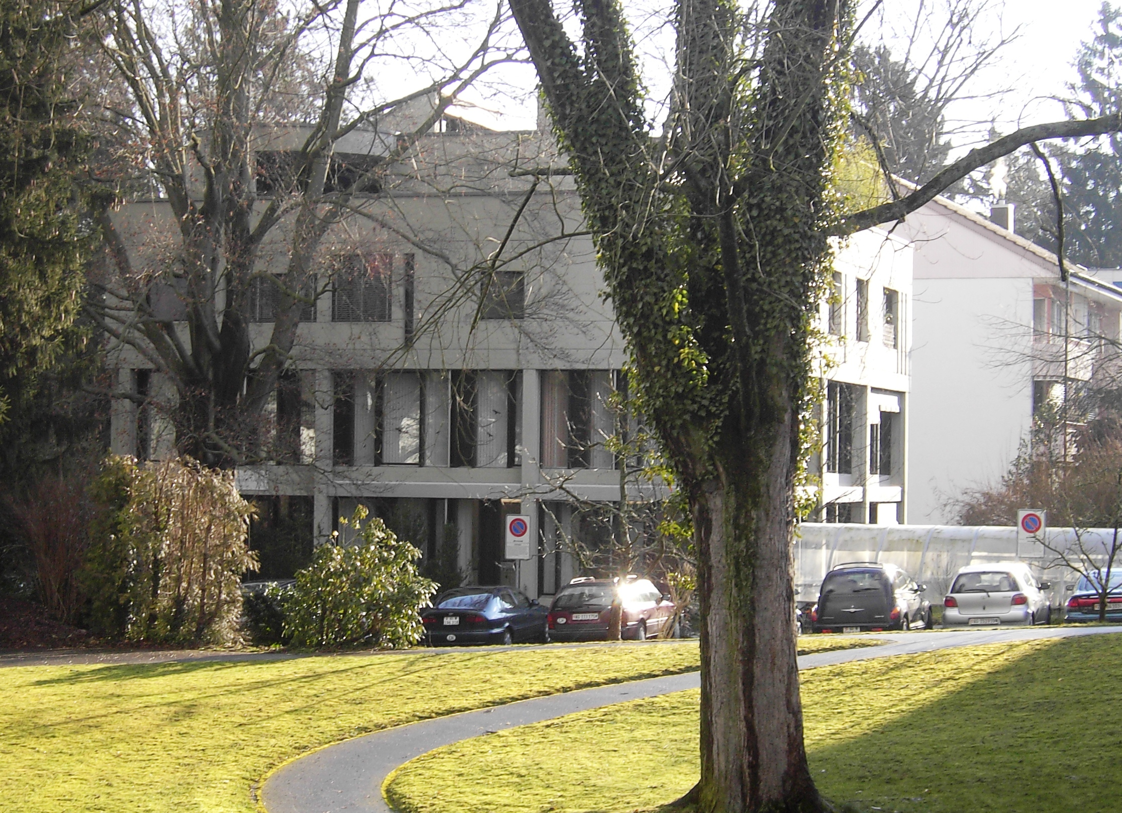 "Haus der Kirche" in Aarau, Schweiz; Das ehemalige Verwaltungsgebäude der Reformierten Landeskirche Aargau